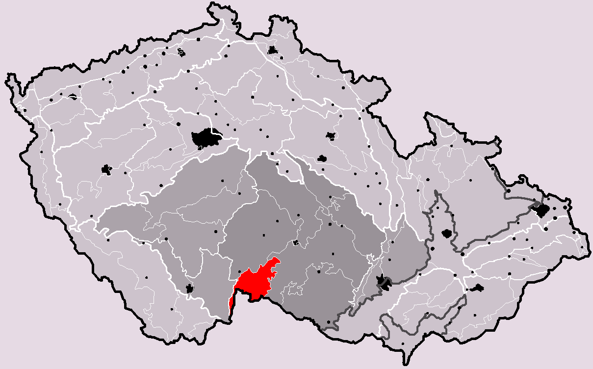 Poloha geomorfologického celku Javořická vrchovina v rámci České republiky. Hercynský systém Hercynská pohoří I Česká vysočina I2 (II) Česko-moravská subprovincie I2C (IIC) Českomoravská vrchovina I2C-6 (IIC-6) Javořická vrchovina